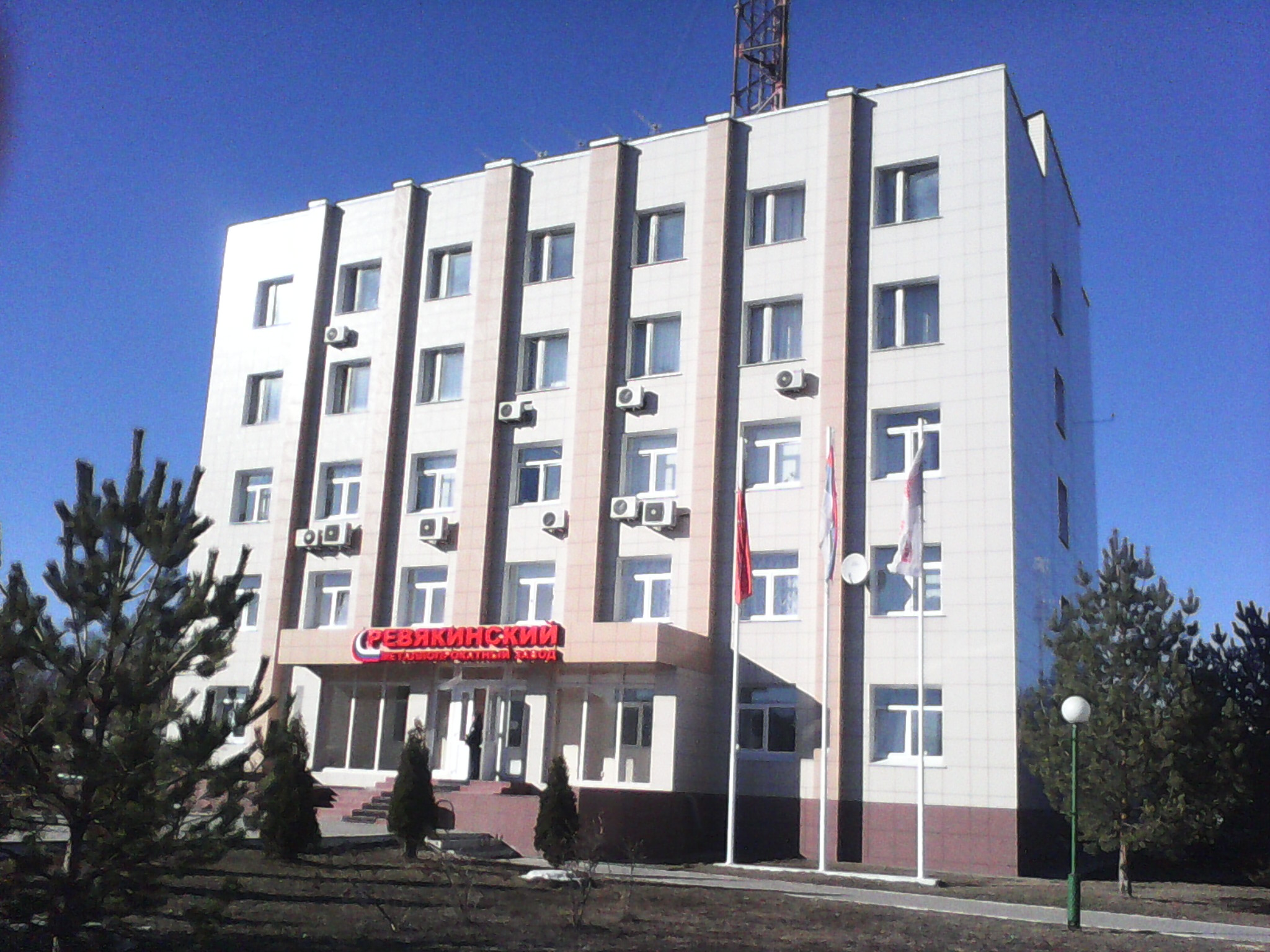 Ревякинский завод